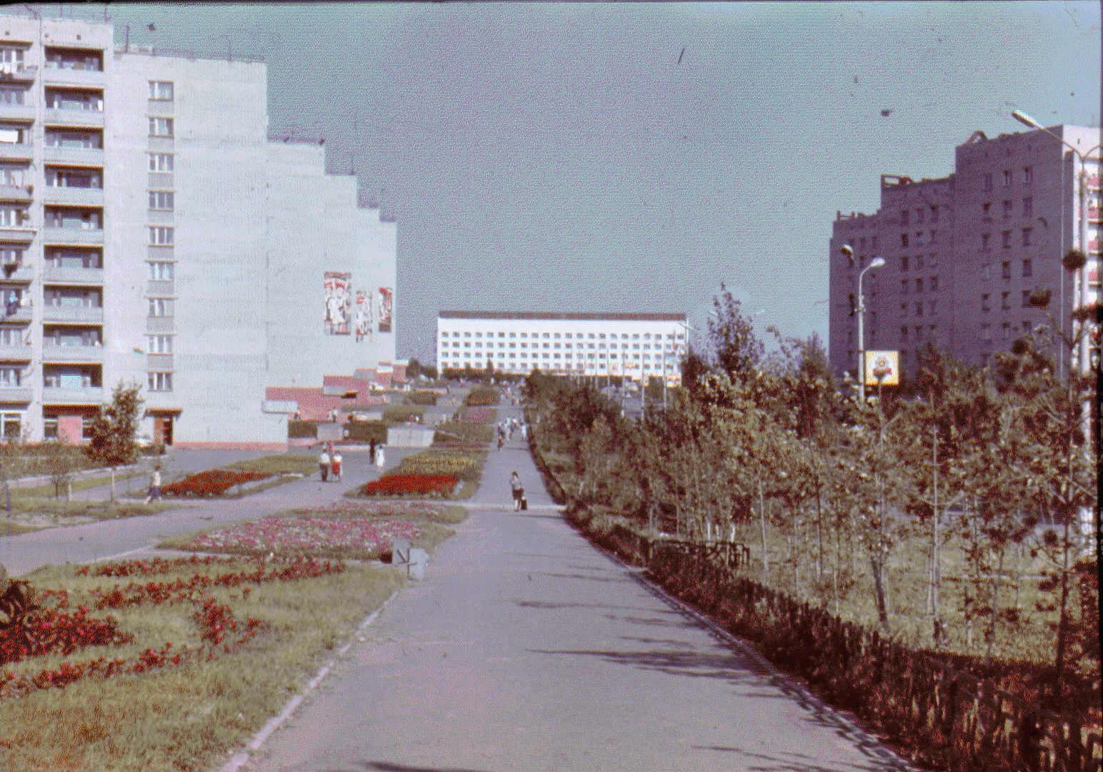 Амурск, 1985 год. Сфотографировано на цветную негативную фотоплёнку ЦНД-32